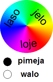 来源：根据 File:Tokipona colours.png 加工合成